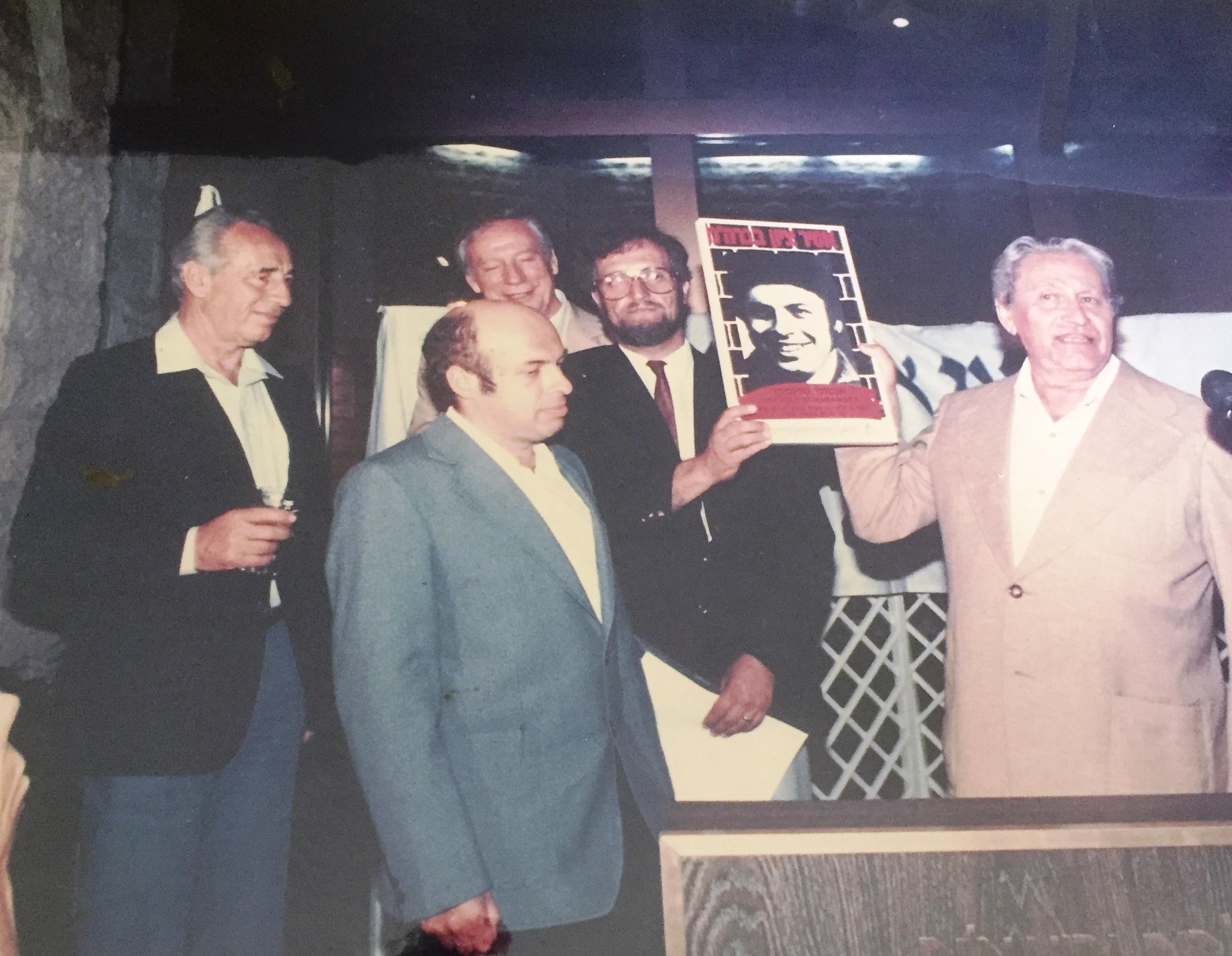 דוד יפית מימין בחליפה הבהירה , כפי שצולם במאי 1986 באירוע בבריכת הסולטן לכבוד שחרורו של שצ'רנסקי